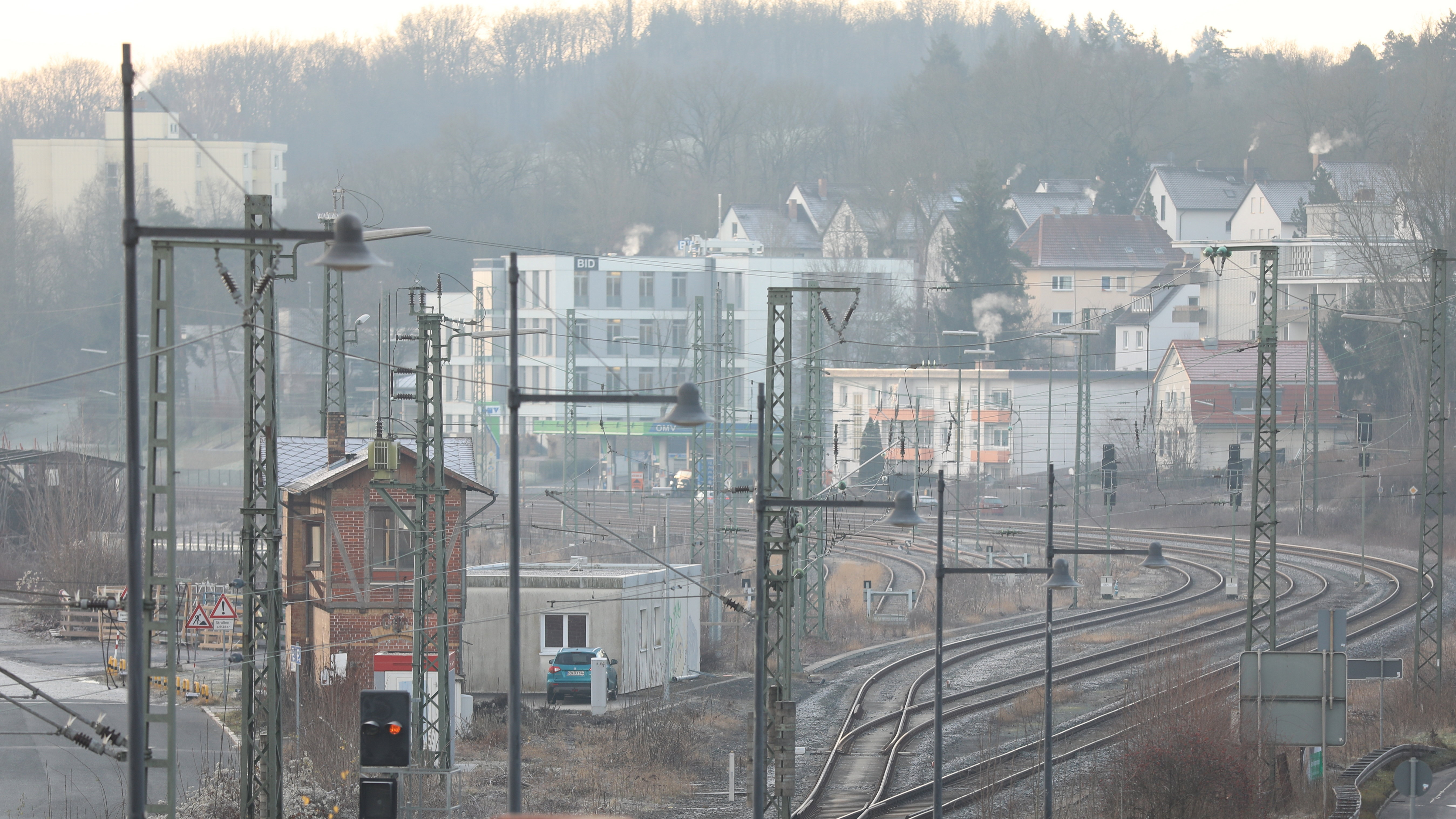 Coburger Güterbahnhof, Gleisanlagen